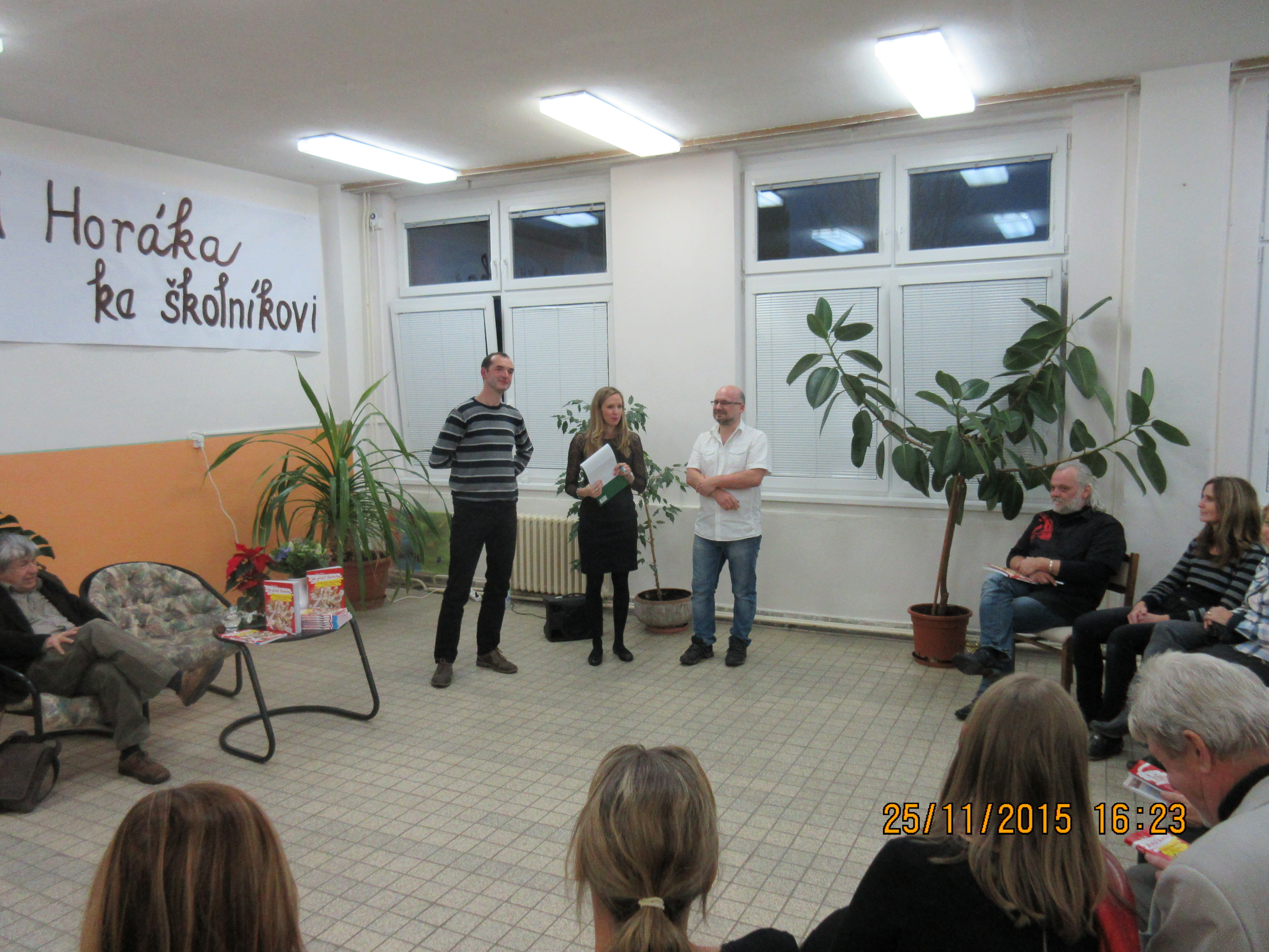 Pan Bárta vlevo při křtu jeho knihy a oslavě školního časopisu